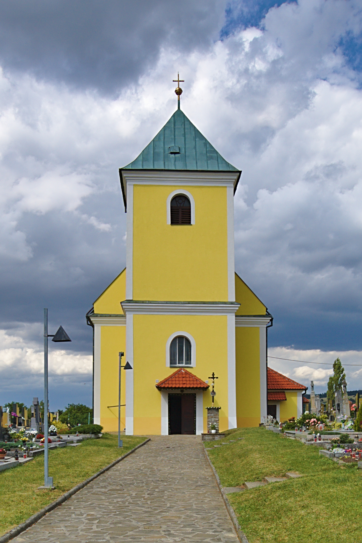 Kostel svatého Matouše, Nová Lhota, okres Hodonín